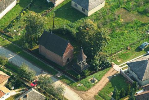 Szamostatárfalva, Hungary, aerialphotography